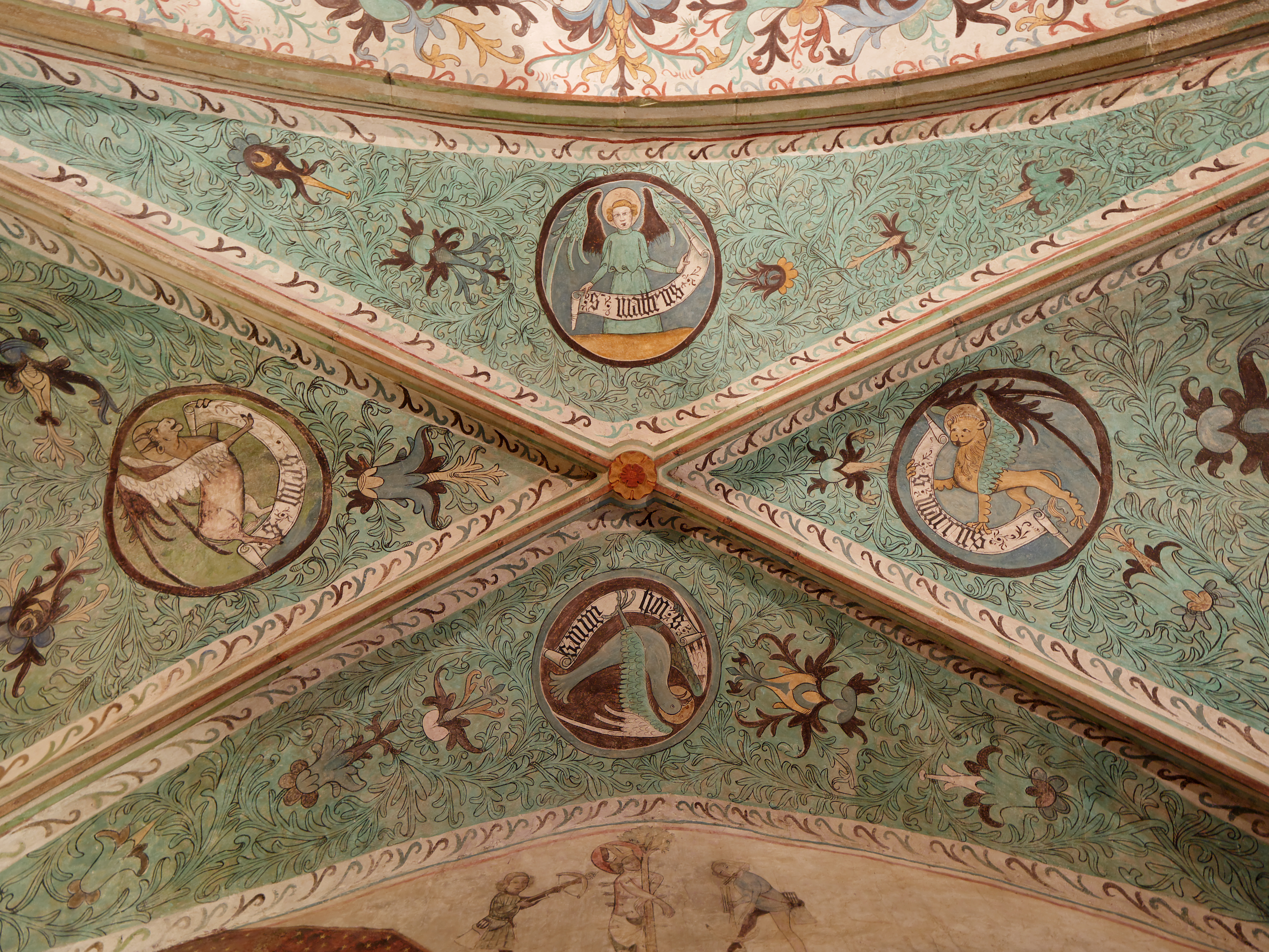 Nikolaikirche Jüterbog, Evangelisten im Kreuzrippengewölbe der Südkapelle